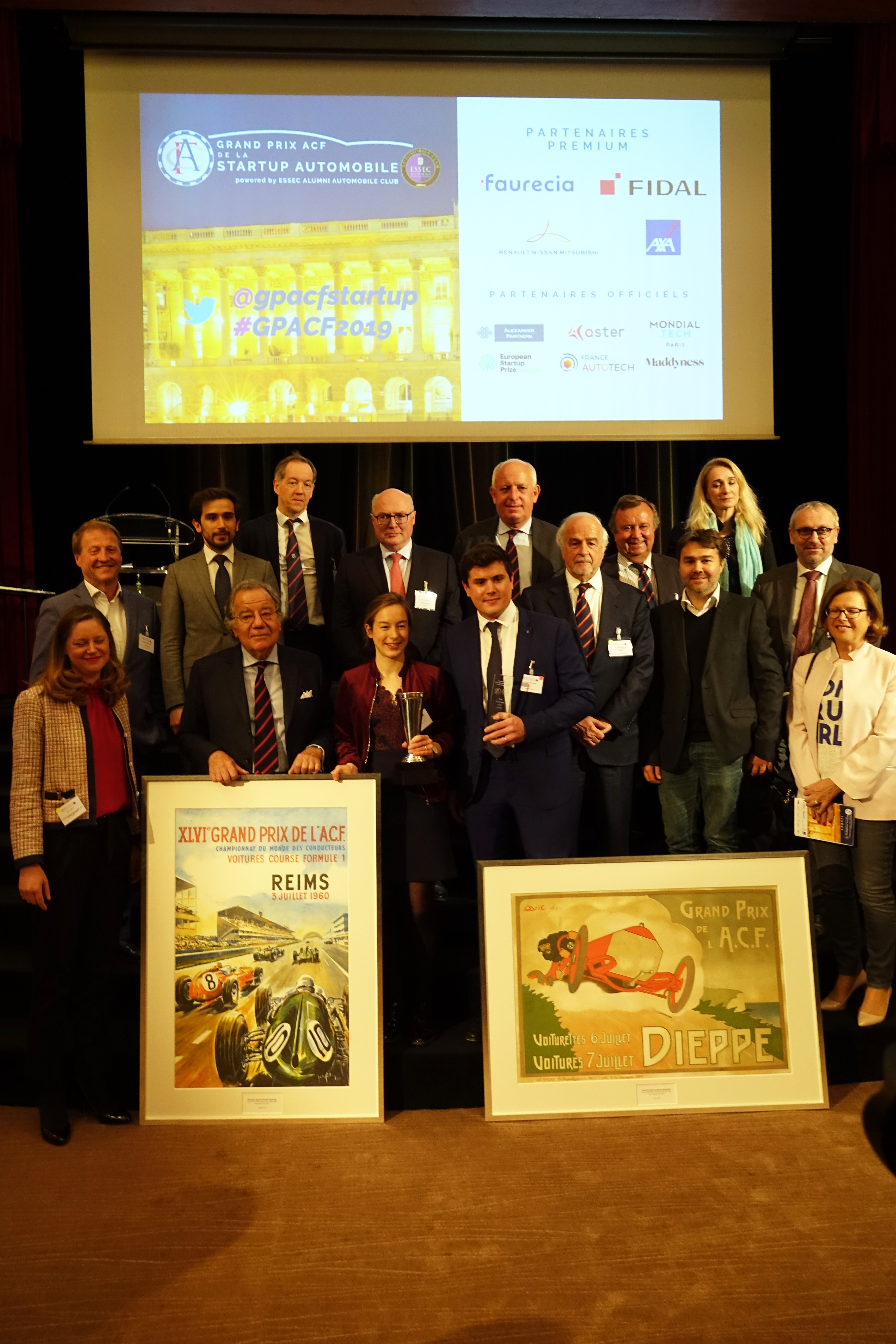 Claire Cano-Houllier (Expedicar ) et Cedric Bernard (ProovStation)